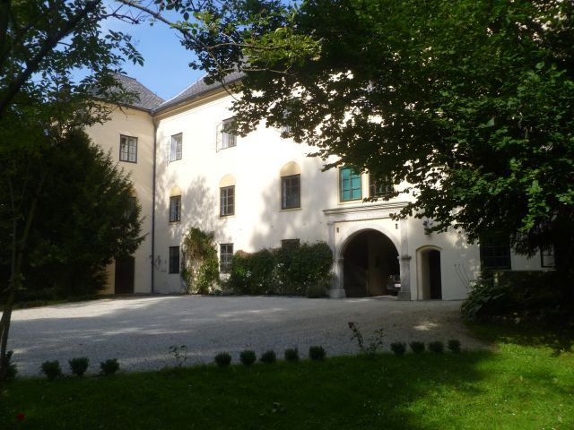 Schloss_Starhemberg_(Eingangsportal)